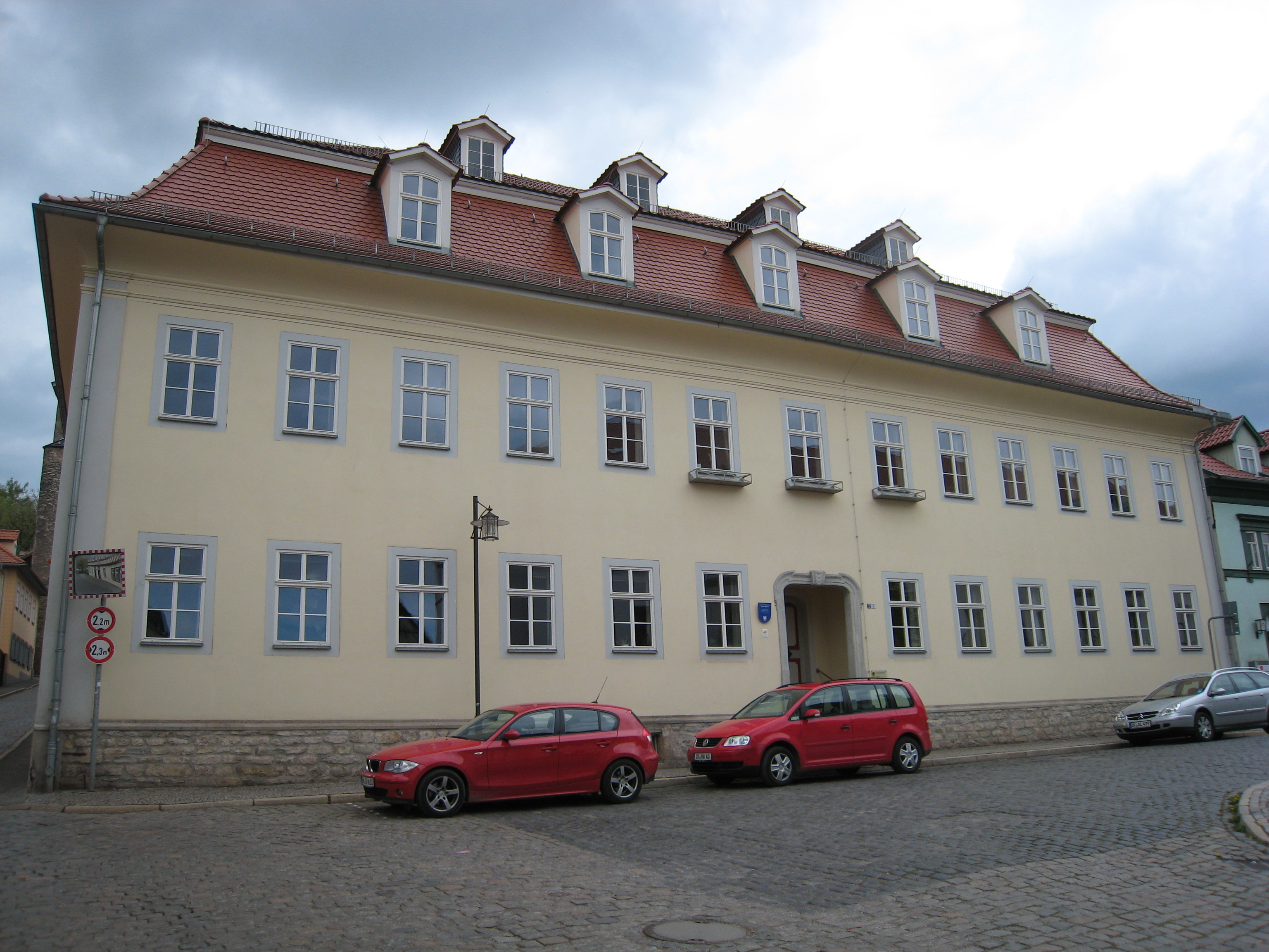 Das ehemalige Waisenhaus in Arnstadt (Am Plan).